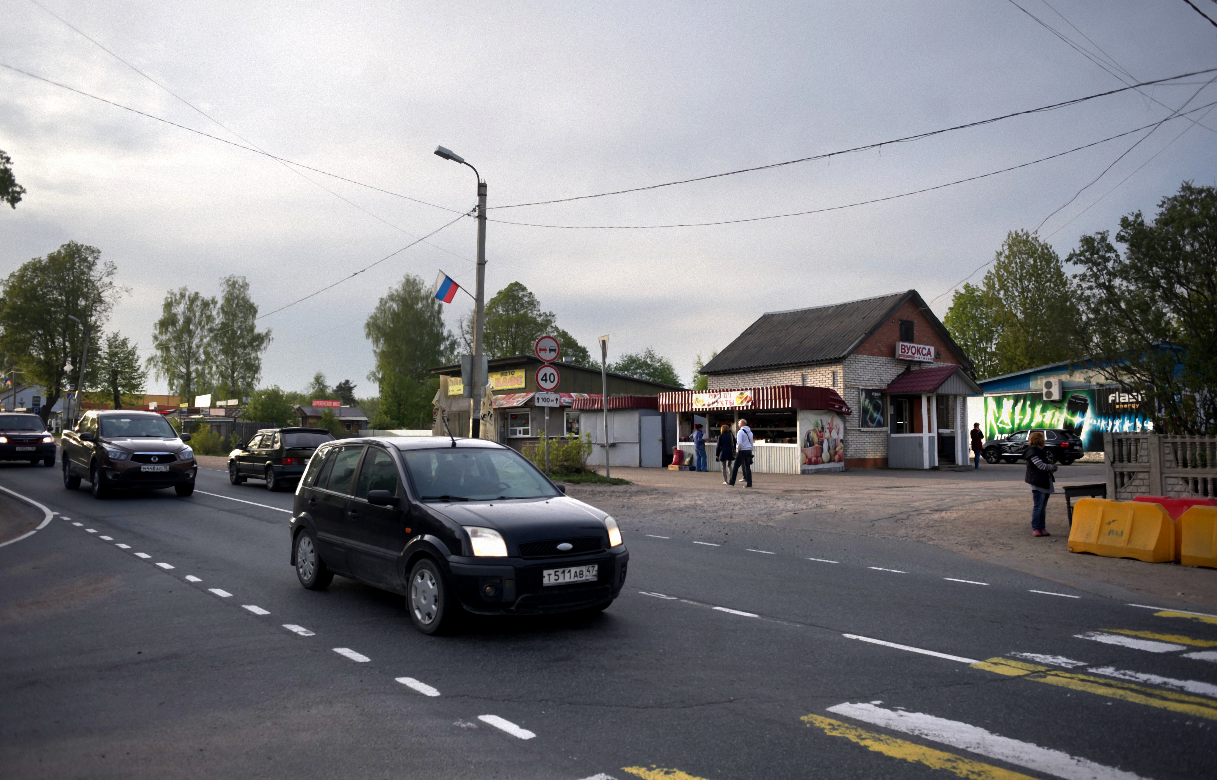 Kiviniemeä 14.5.2016